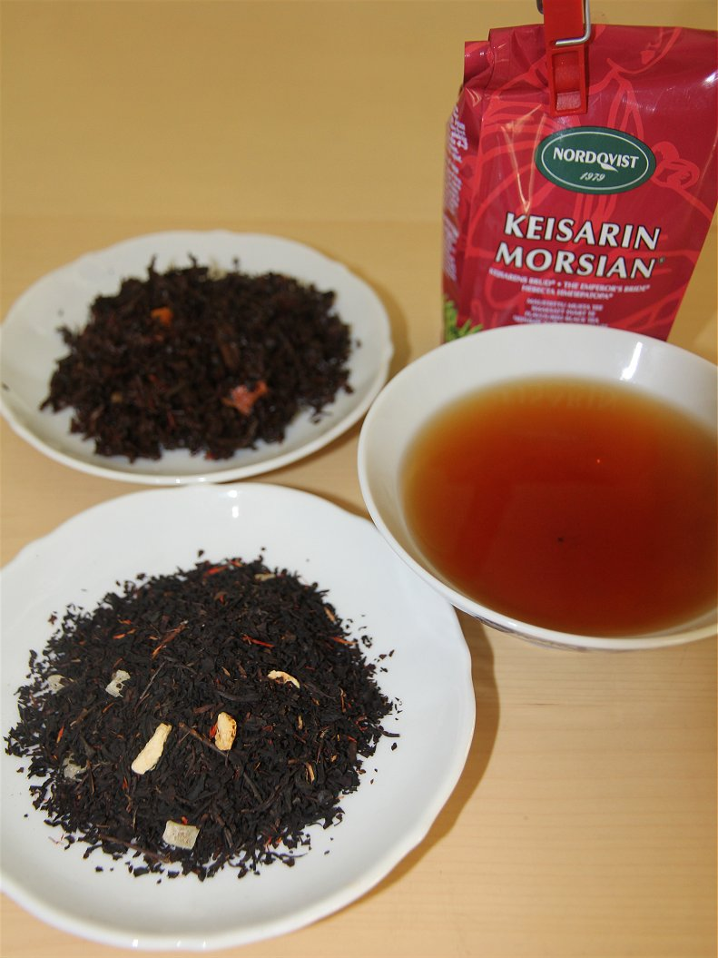 Keisarin Morsian vuonna 1985 suomalaisessa Nordqvistin teetalossa kehitetty, morsianta etsivästä keisarista kertovan tarinan pohjalle luotu teelaatu. Keisarin Morsian on Suomen suosituimpiin kuuluva maustettu teesekoitus.Pohjana on mustaa assam- ja ceylonteetä.